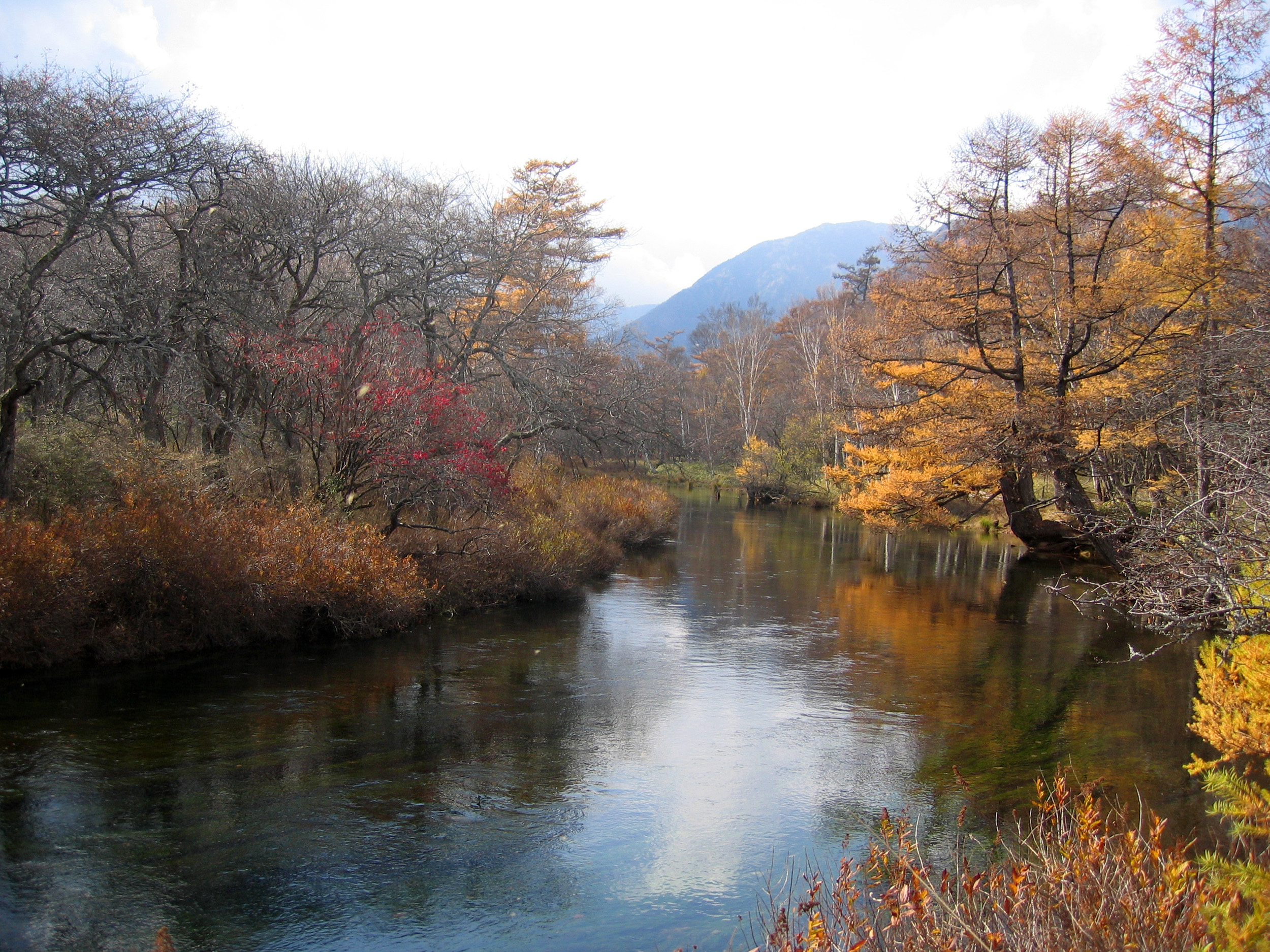 Yukawa (湯川 (日光市)) in Nikkō, Japan.